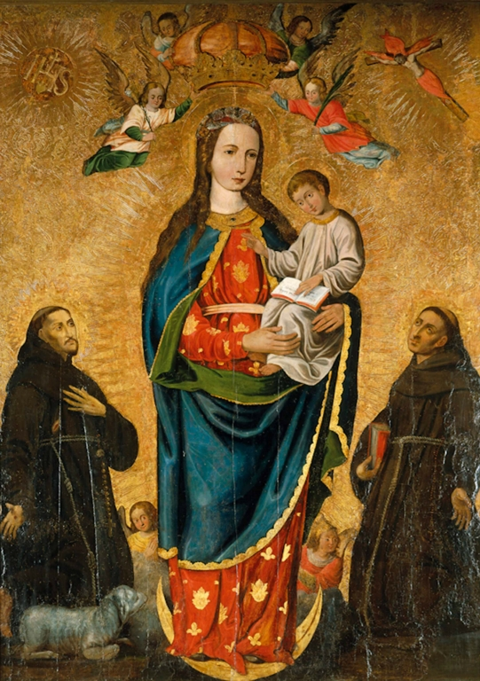 Вільня. Мадонна Сапегаў.